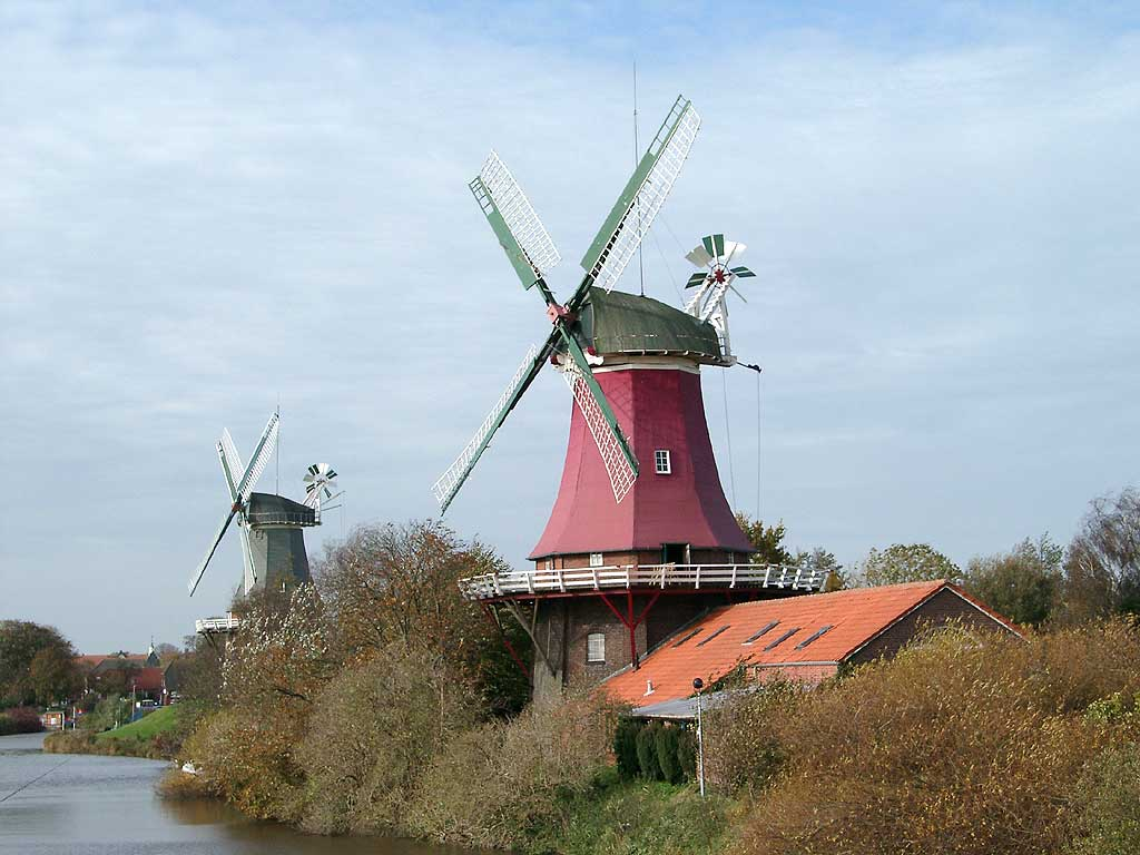 Zwillingsmühlen von Greetsiel